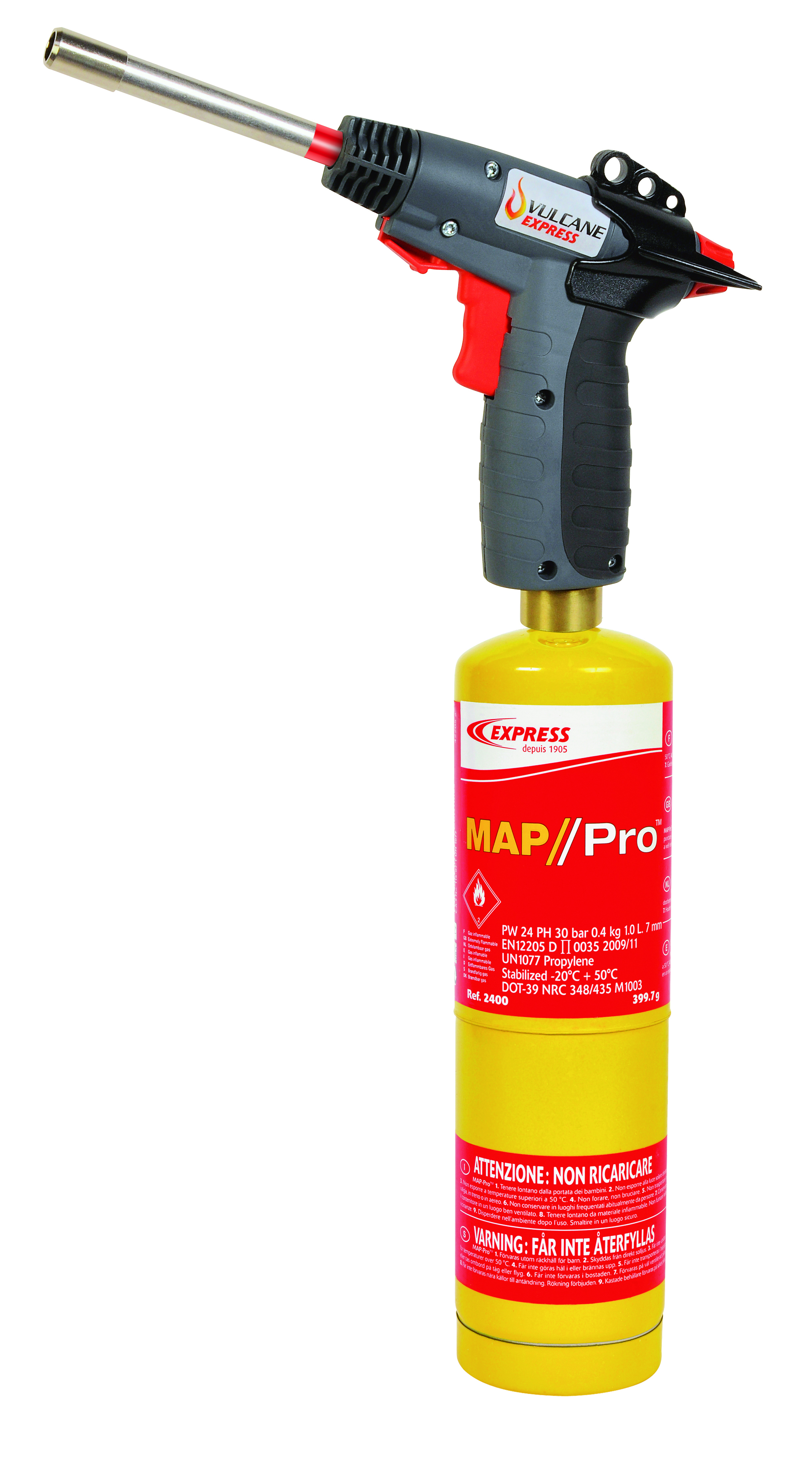 Chalumeau Vulcane Express, le dernier né des chalumeaux de Guilbert Express ici en version lance 4722 pour climatisation